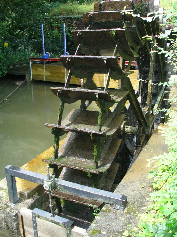 Biberach an der Riß - Obere Mühle - Wasserrad